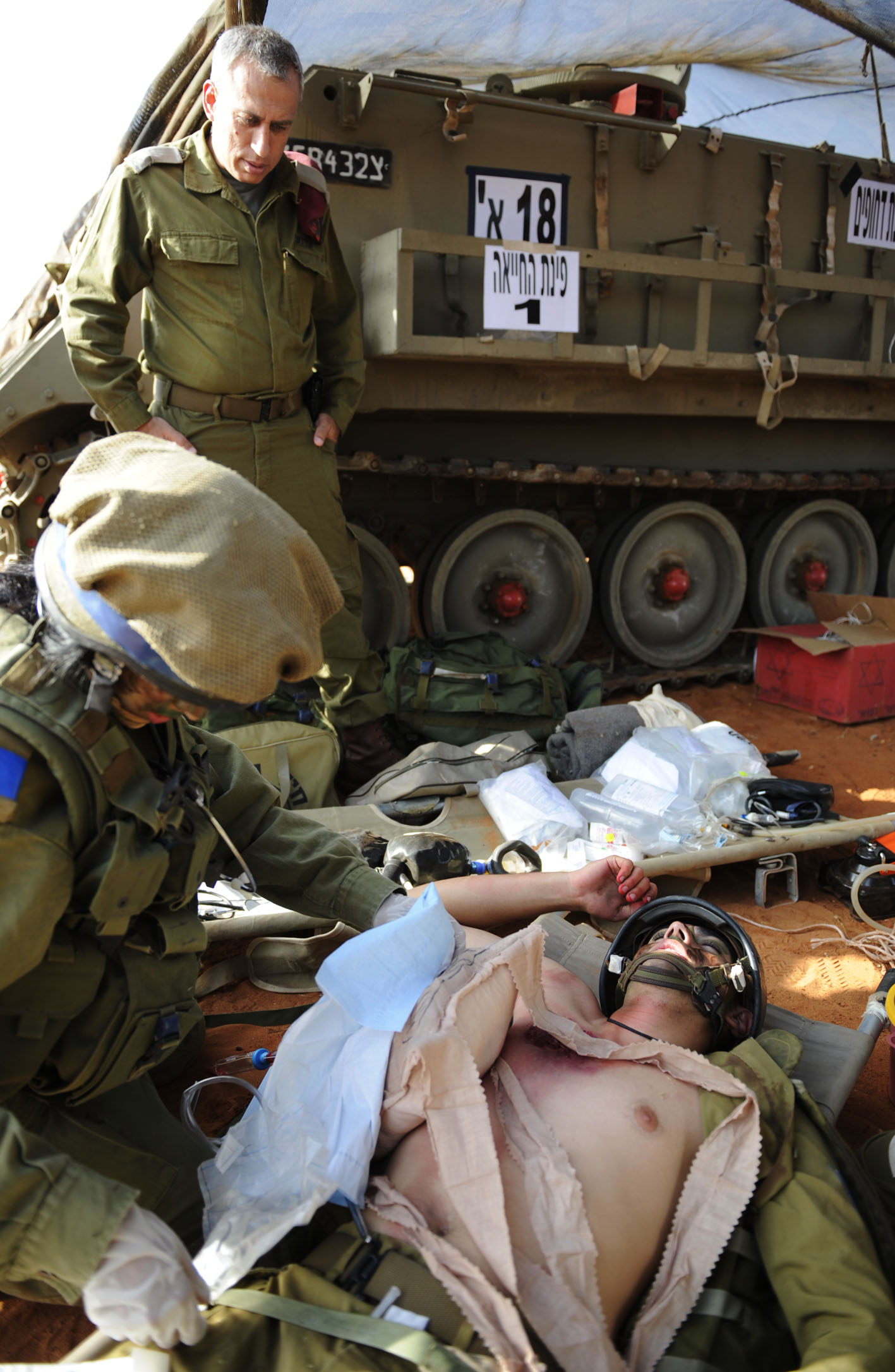 October 27, 2010. The Medical Corps concludes a final test for the largest course of medical doctors to ever graduate in IDF history. Approximately 50 newly-appointed doctors will be finishing the course next week and getting their placement throughout the various IDF units in the sea, land, and air. This marks the IDF's final step in filling the noticeable lack of doctors in the army, and from now on there will be a doctor in every battalion. The Commander of the Medical Corps, Brig. Gen. Dr. Nachman Ash, tested the IDF doctors-to-be and congratulated the participants: “These are doctors full of motivation, with a sparkle in their eyes. They are ready and willing to do their work. There is no doubt that from now on, with the manning of the positions in all field units, the medical response for soldiers will correspond to the need.” חיל הרפואה קיים אתמול (ד') תרגיל מסכם לקורס הרופאים הגדול ביותר בתולדות צה"ל. כ50- רופאים חדשים יסיימו בשבוע הבא את קורס הרופאים הצבאי וישובצו ביחידות צה"ל השונות, באוויר,בים וביבשה. צה"ל סוגר את פער הרופאים הגדול שהורגש בגדודים, ומעכשיו יהיה רופא לכל גדוד בצה"ל. קצין הרפואה הראשי, תא"ל ד"ר נחמן אש, בחן את הרופאים לעתיד של צה"ל וברך את המשתתפים: "אלה רופאים מלאי מוטיבציה וברק בעיניים, הם נכונים ורוצים לעשות את עבודתם. אין ספק שמעתה, עם איוש כלל יחידות השדה ברופאים, גם המענה לחיילים יהיה בהתאם".